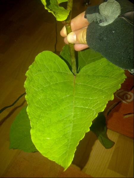 Blattoberseite von Reynoutria x bohemica